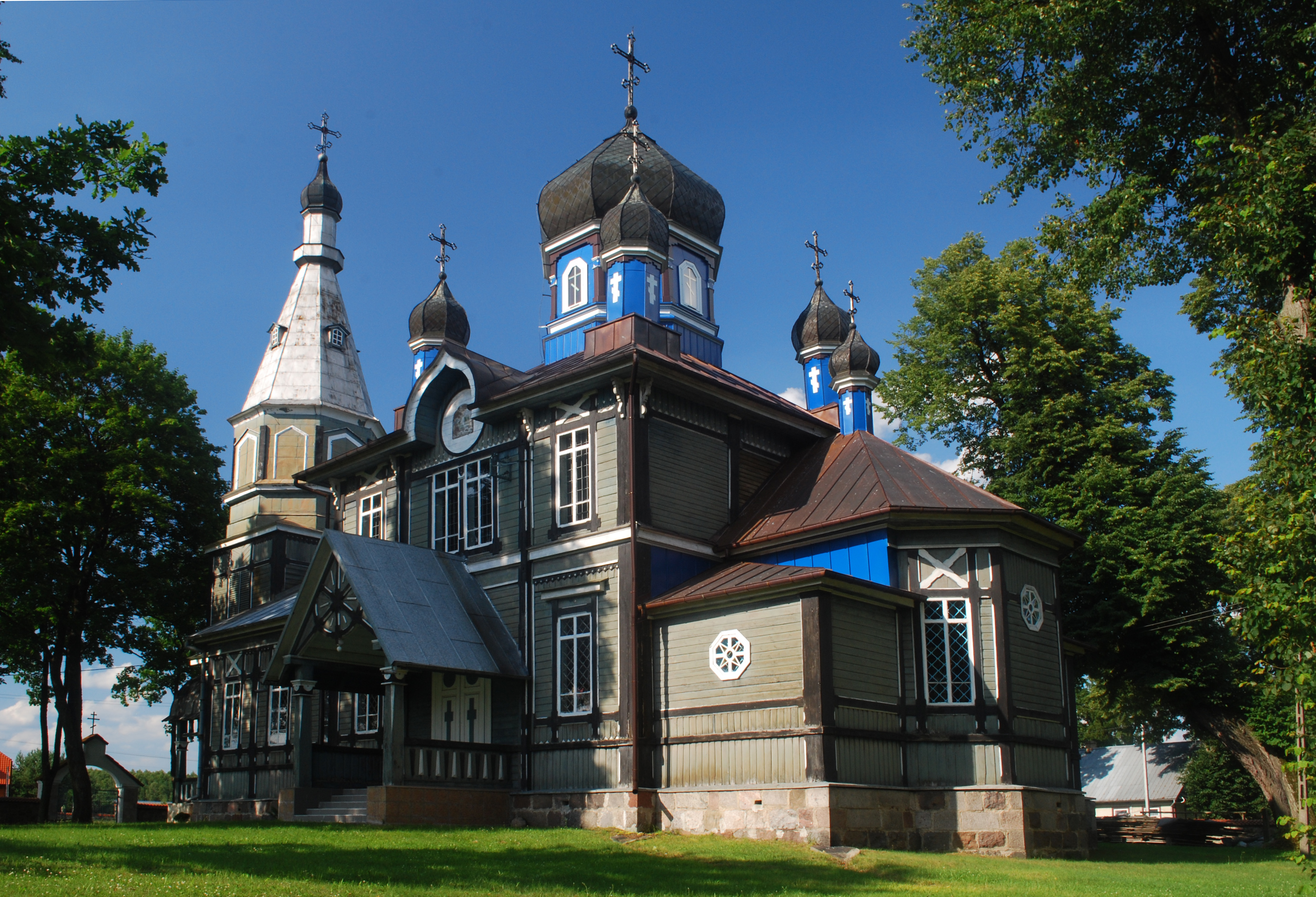 Sanktuarium prawosławne w Puchłach. The making of this document was supported by Wikimedia Polska.